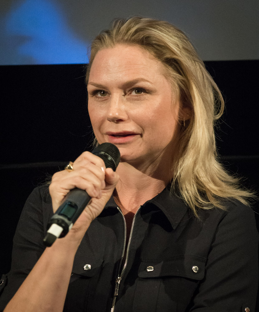 Malin Levanon under presentationen av den Svenska filmhösten i Filmhuset i Stockholm den 17 augusti 2015.